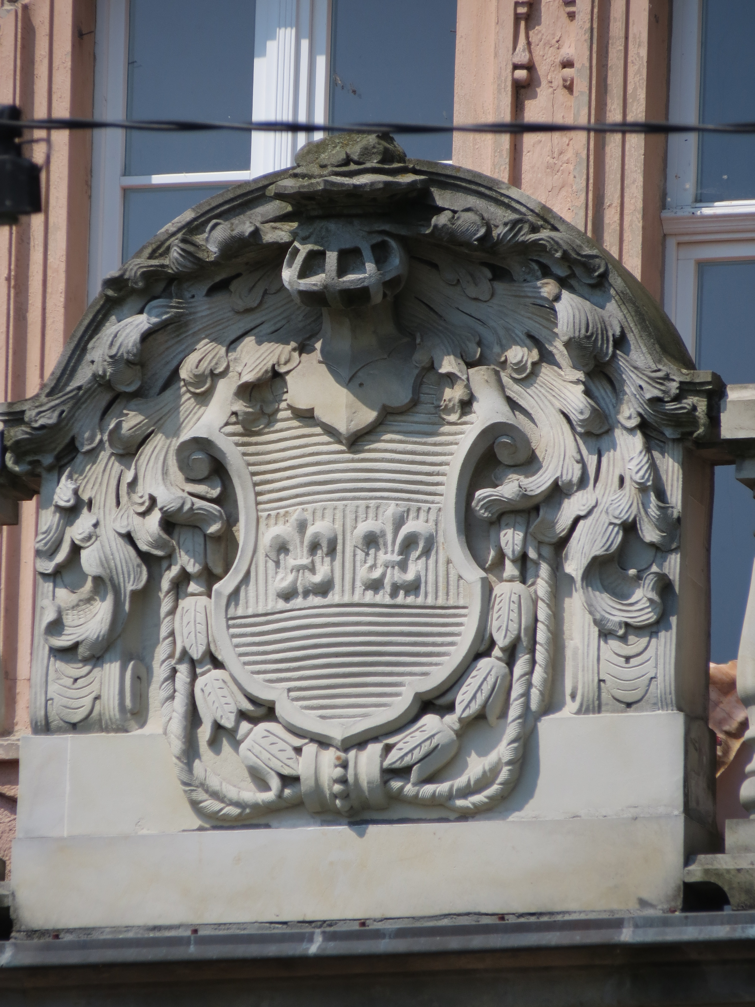 Niwnice, pałac, ob. szkoła, 1800